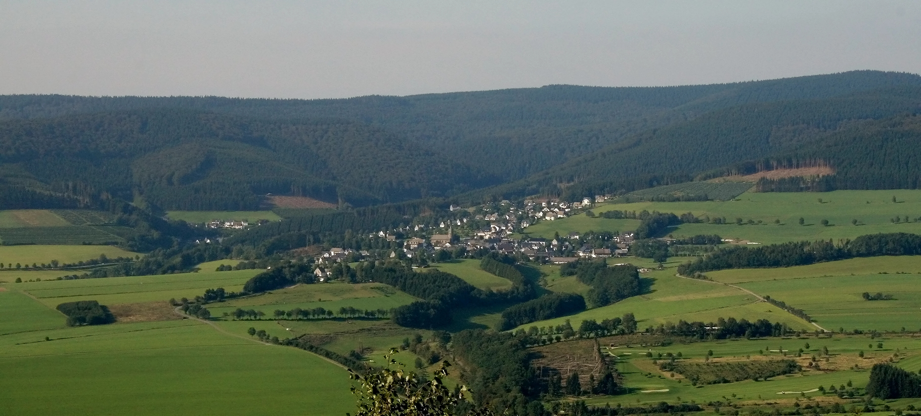 Blick vom Wilzenbergturm auf die Schmallenberger Ortsteile Huxel und Holthausen (Schmallenberg)